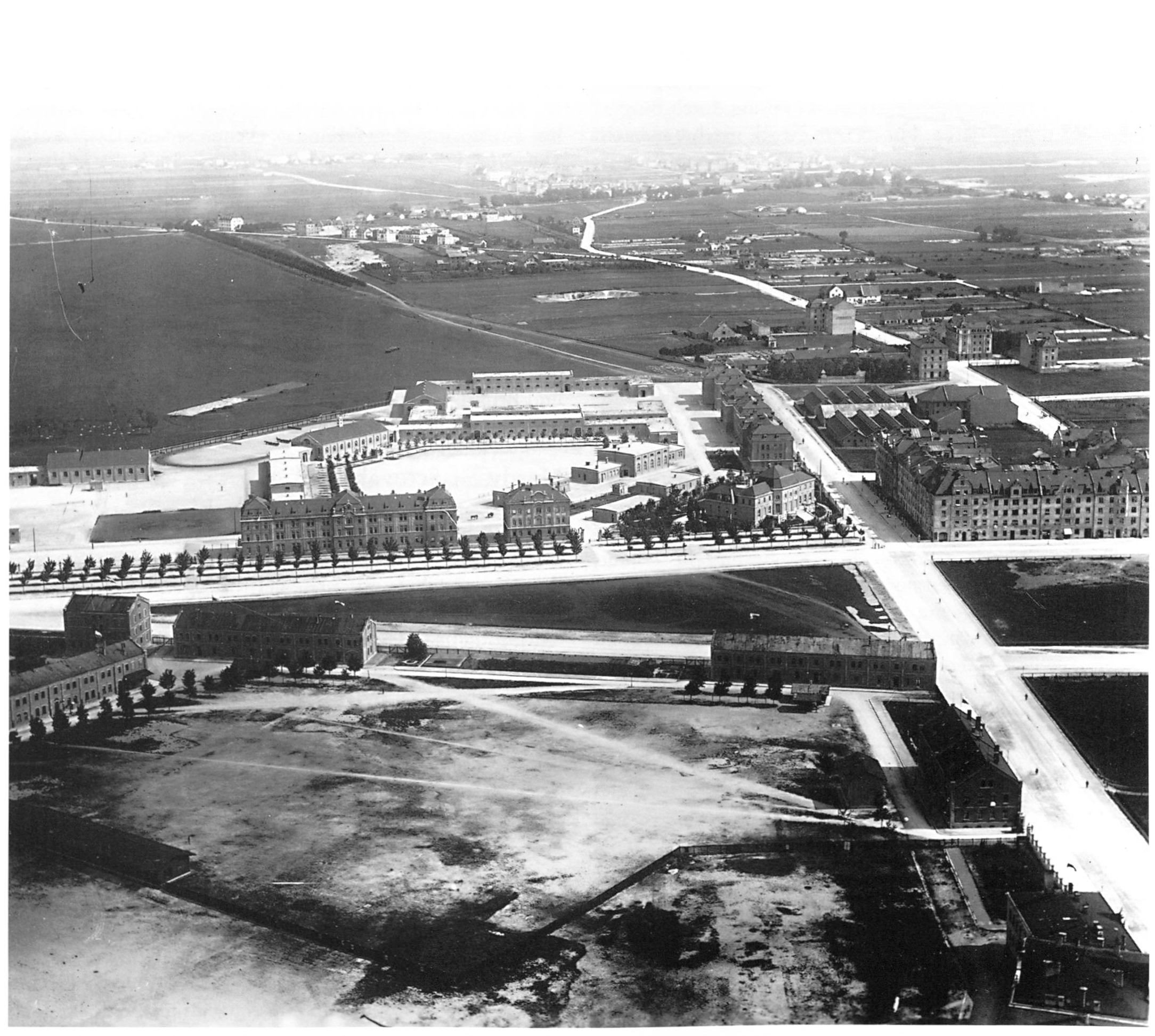 Luftaufnahme der Kasernen auf dem Münchner "Oberwiesenfeld" um 1900. Aufnahme der Luftschifferkompanie